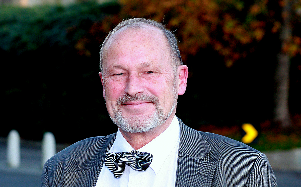 Per Fugelli